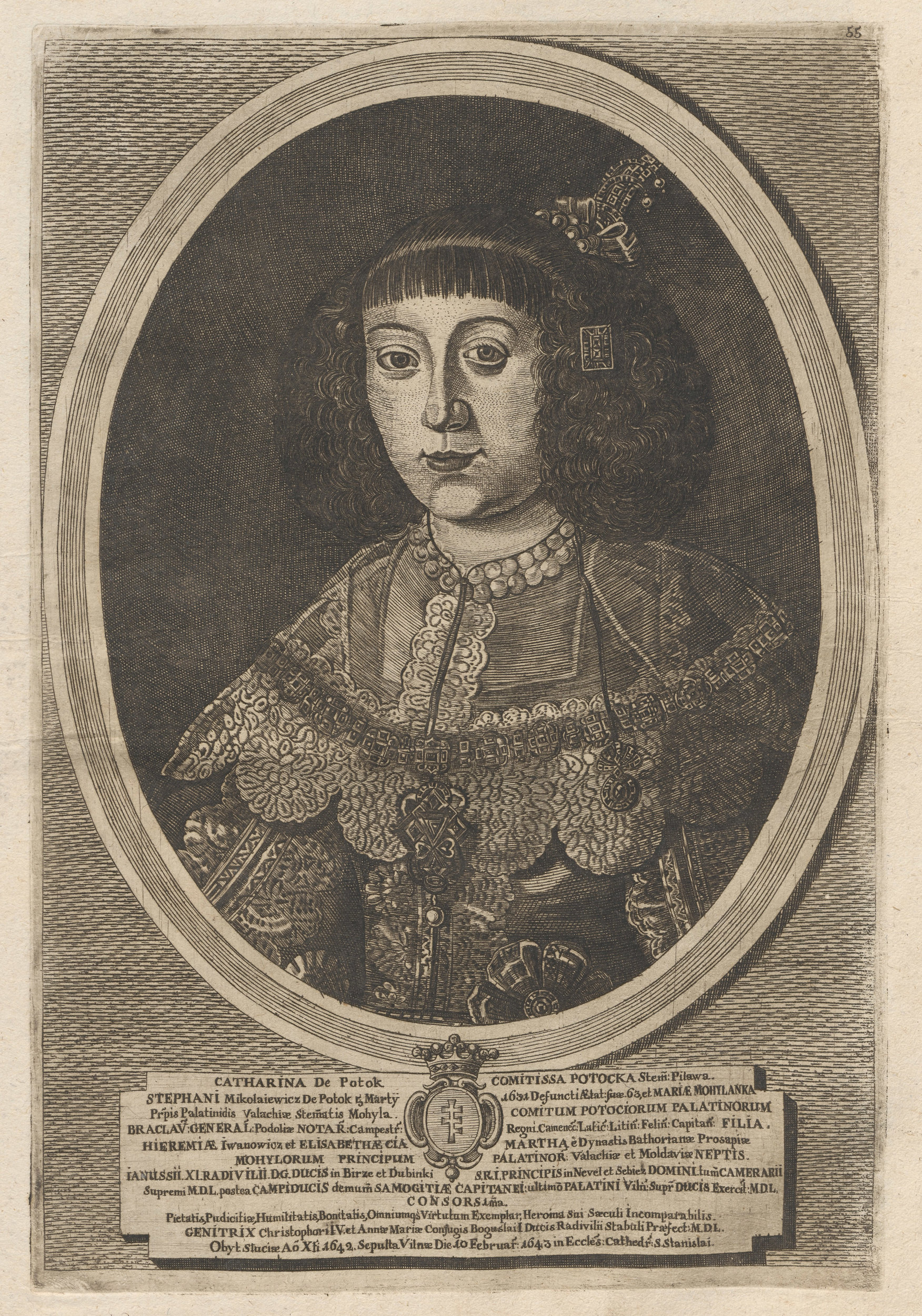 Беларуская (тарашкевіца): Партрэт Кацярыны Радзівіл (Kaciaryna Radzivił) з роду Патоцкіх (Patocki)